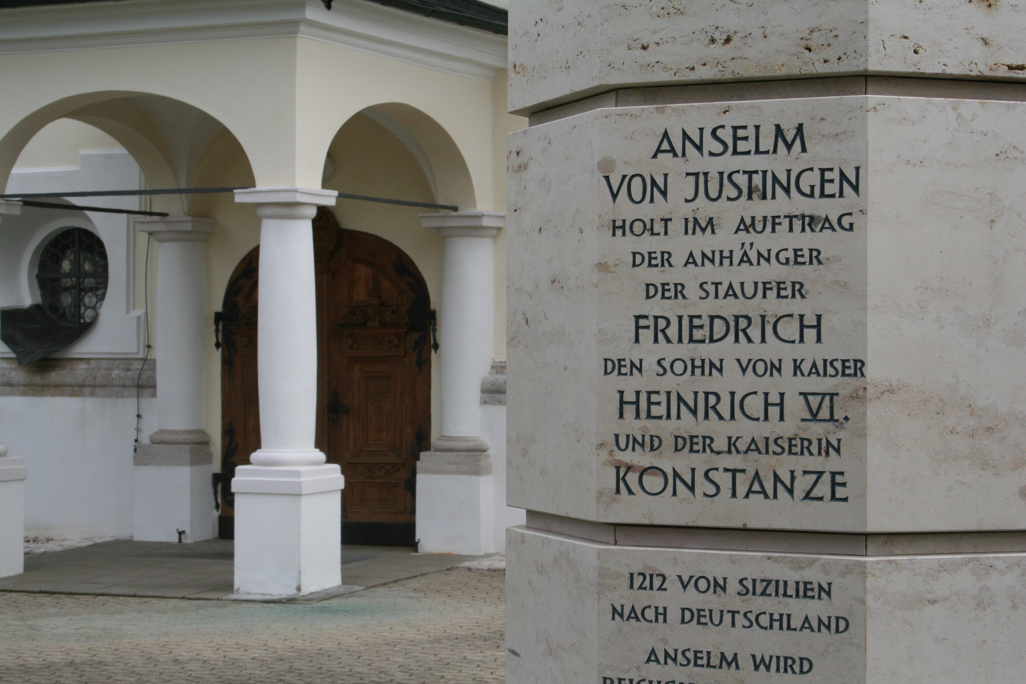 Im Jahr 2012 eingeweihte Stauferstele zu Ehren von Anselm von Justingen